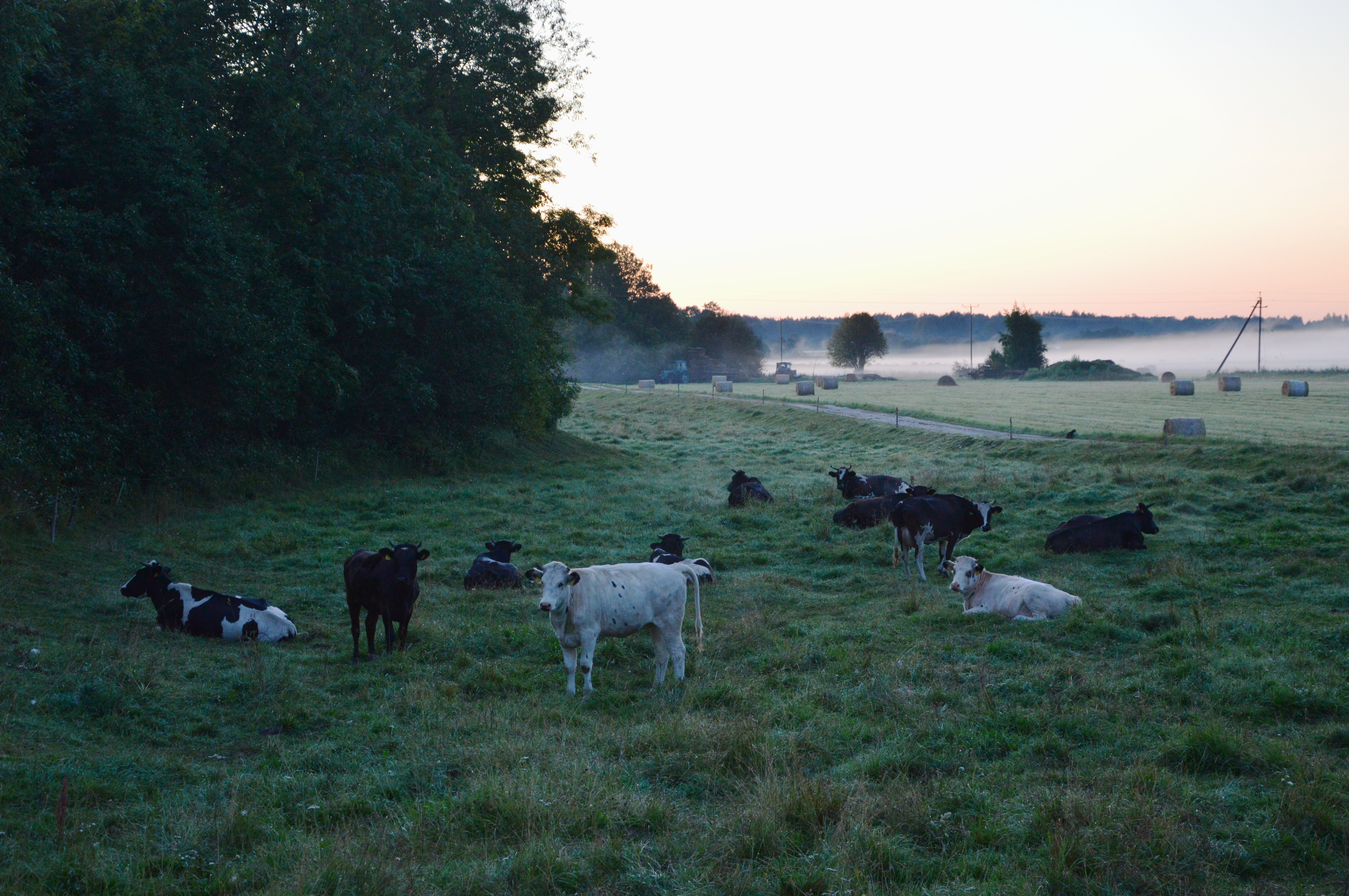 Varahommikune Vängla maastik.